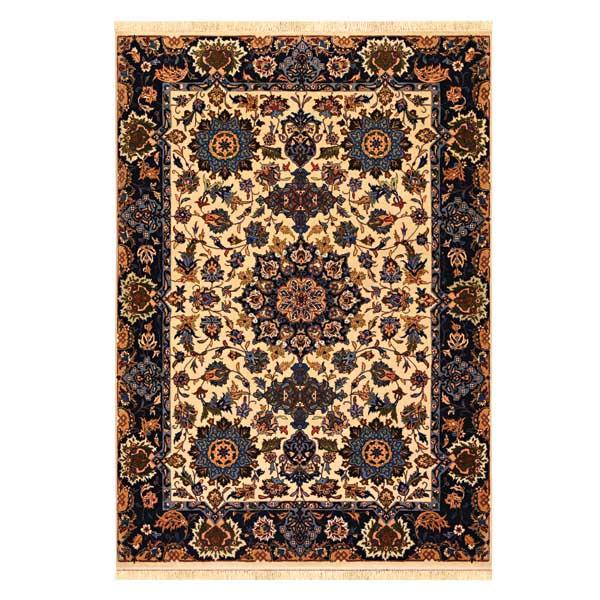 Tapete Persa Semnan Sherkat